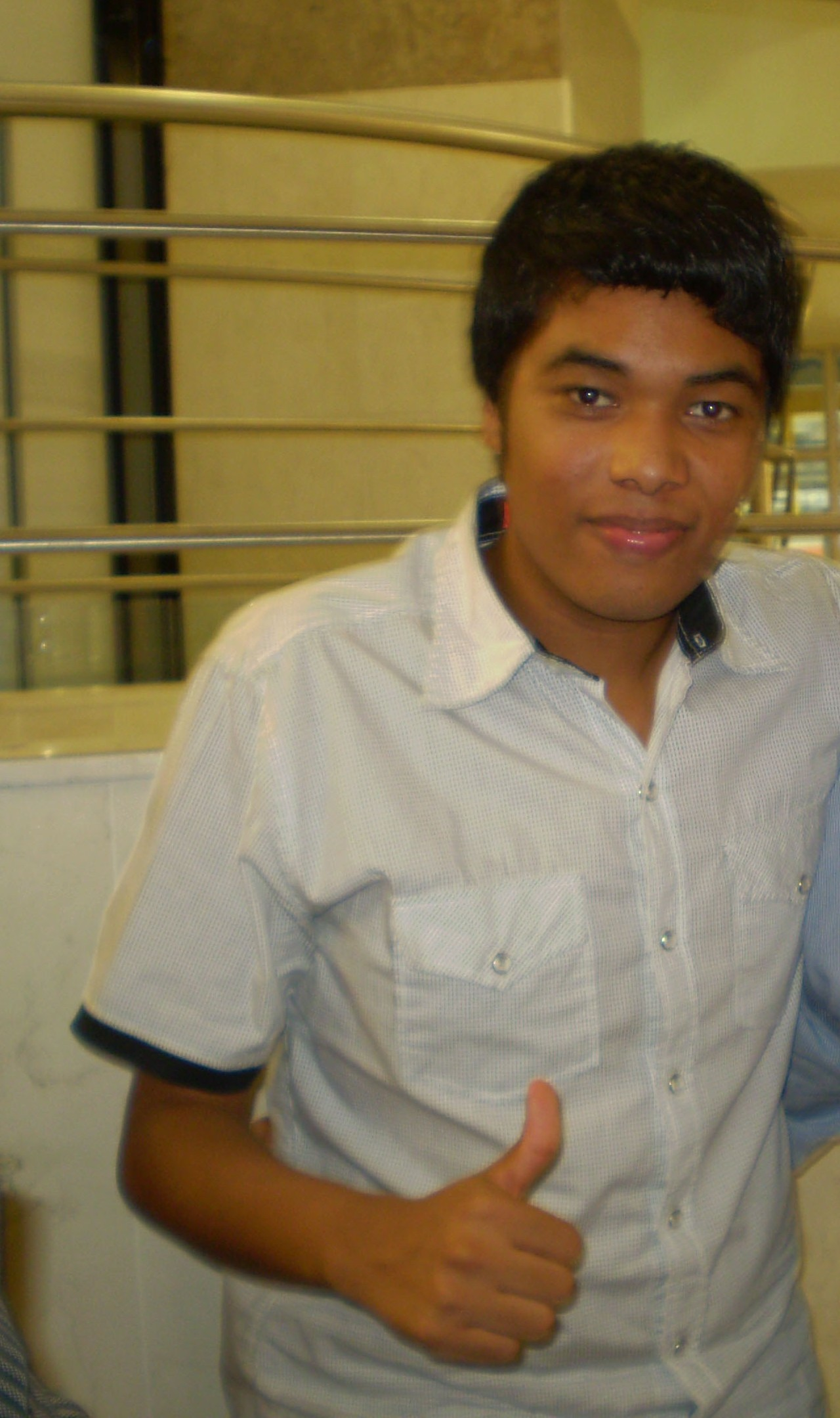 Kanner Morales cantante de Los K Morales